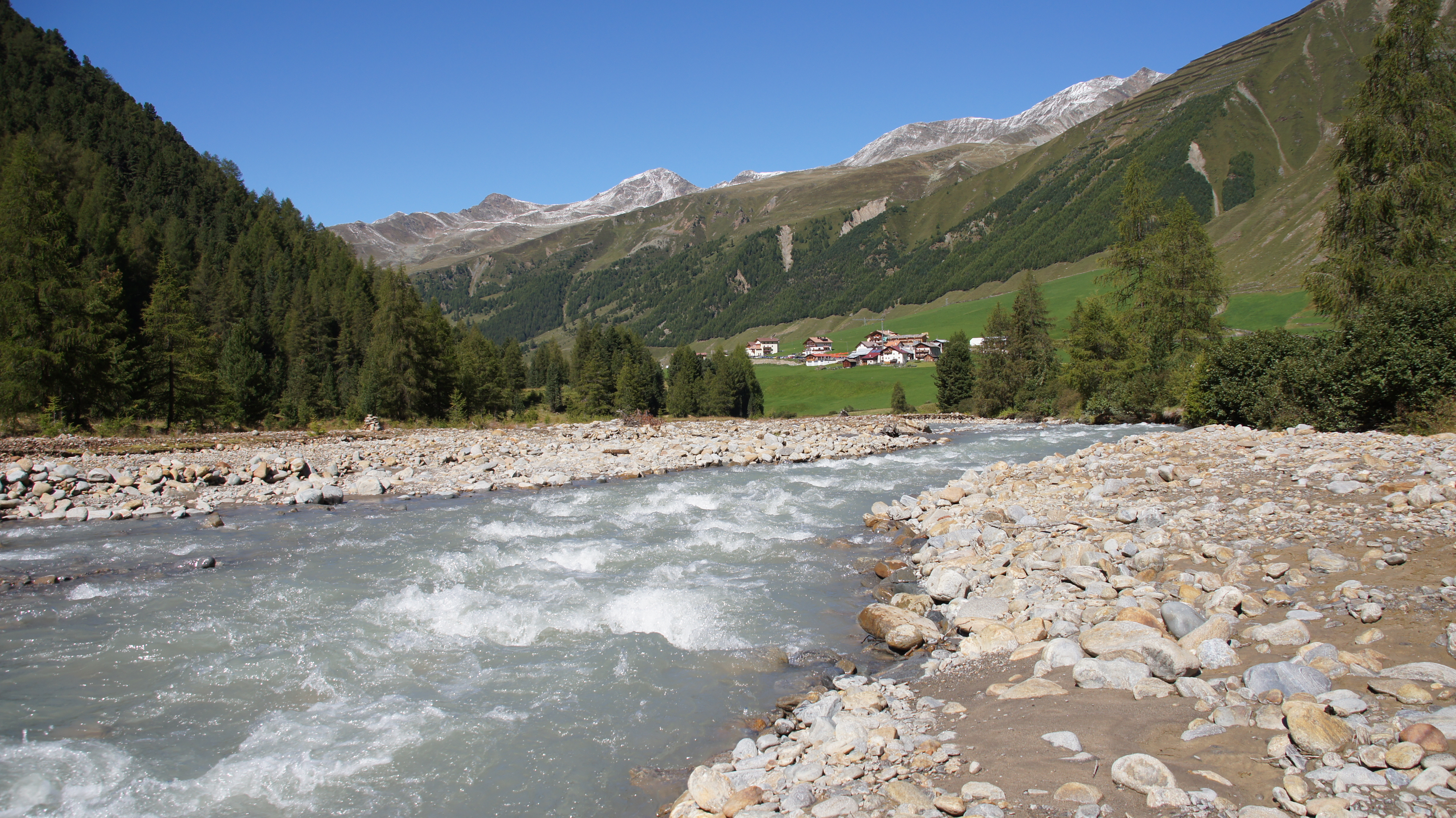 Langtauferer Tal - Blick auf Melag